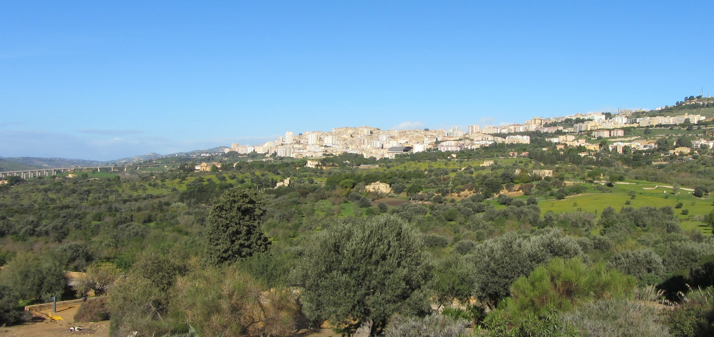 Agrigento